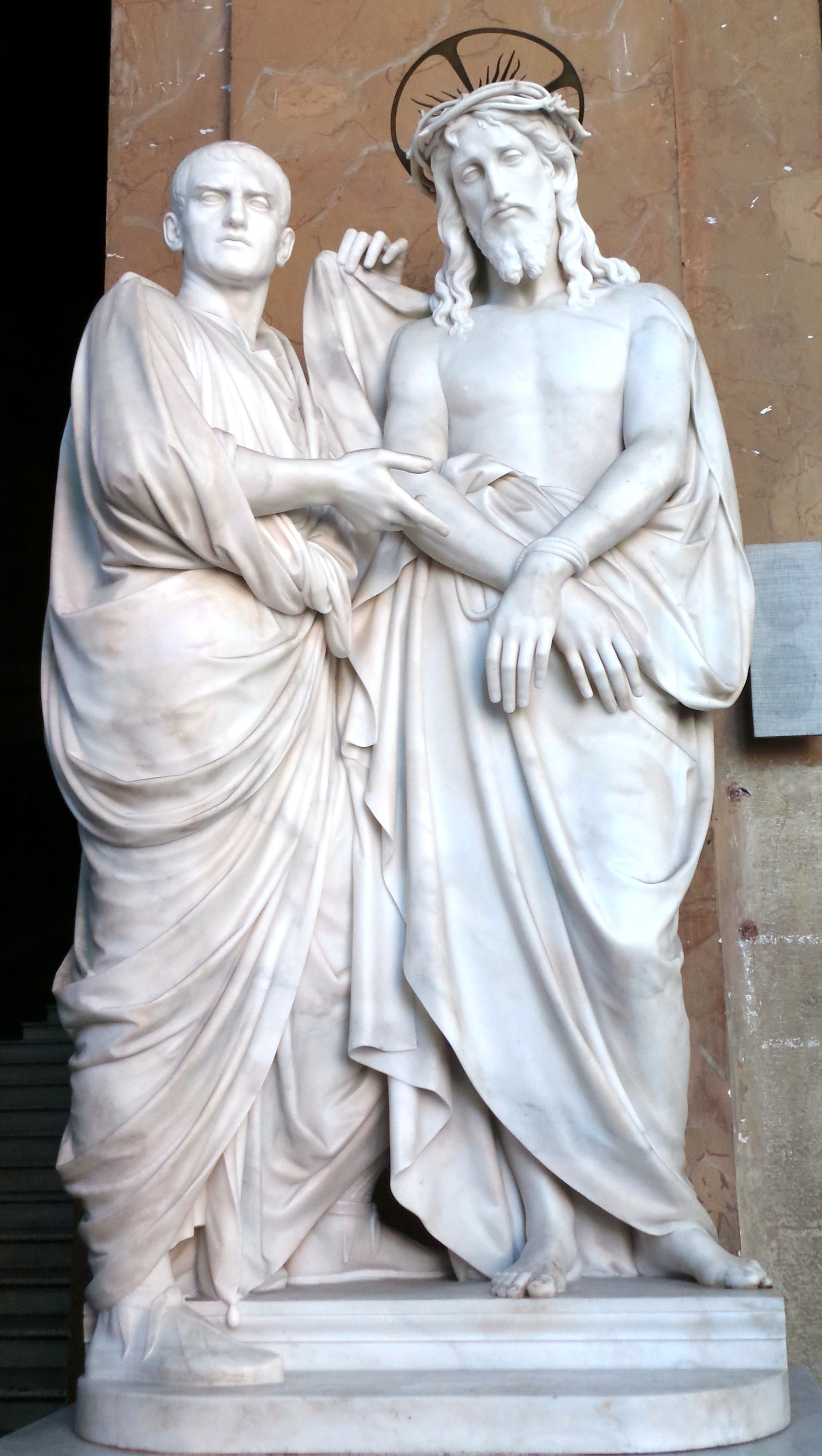 HAEC EST HORA VESTRA ET POTESTAS TENEBRARUM (Lukas 22,53), Skulptur aus dem Jahr 1854 in der Scala Santa in Rom, die Pilatus mit Jesus darstellt.